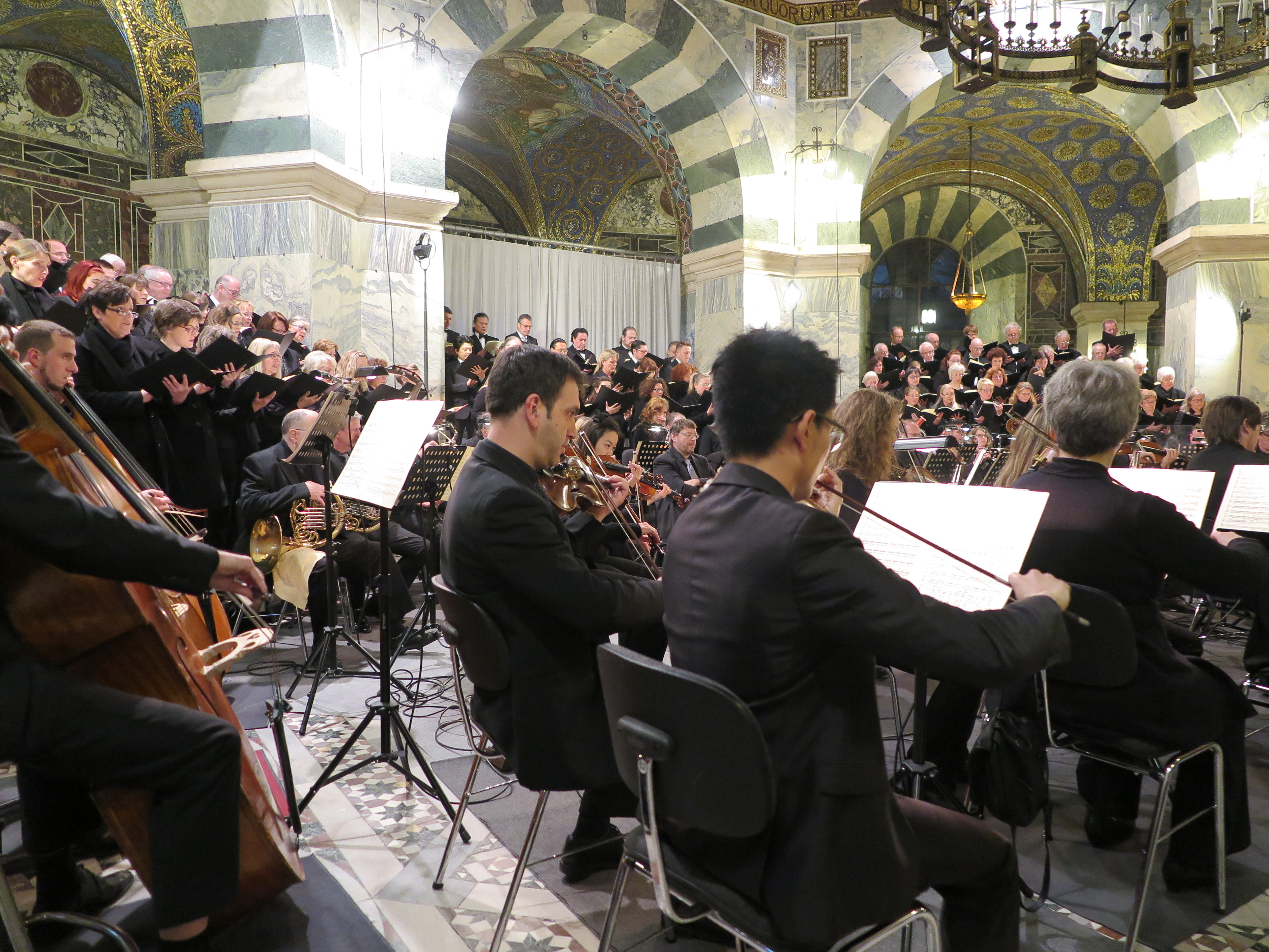 Aufführung von Verdis Requiem im Aachener Dom mit dem Sinfonieorchester Aachen, dem Aachener Opernchor und dem Sinfonischen Chor Aachen unter der Leitung von Generalmusikdirektor Kazem Abdullah am 23. April 2016.